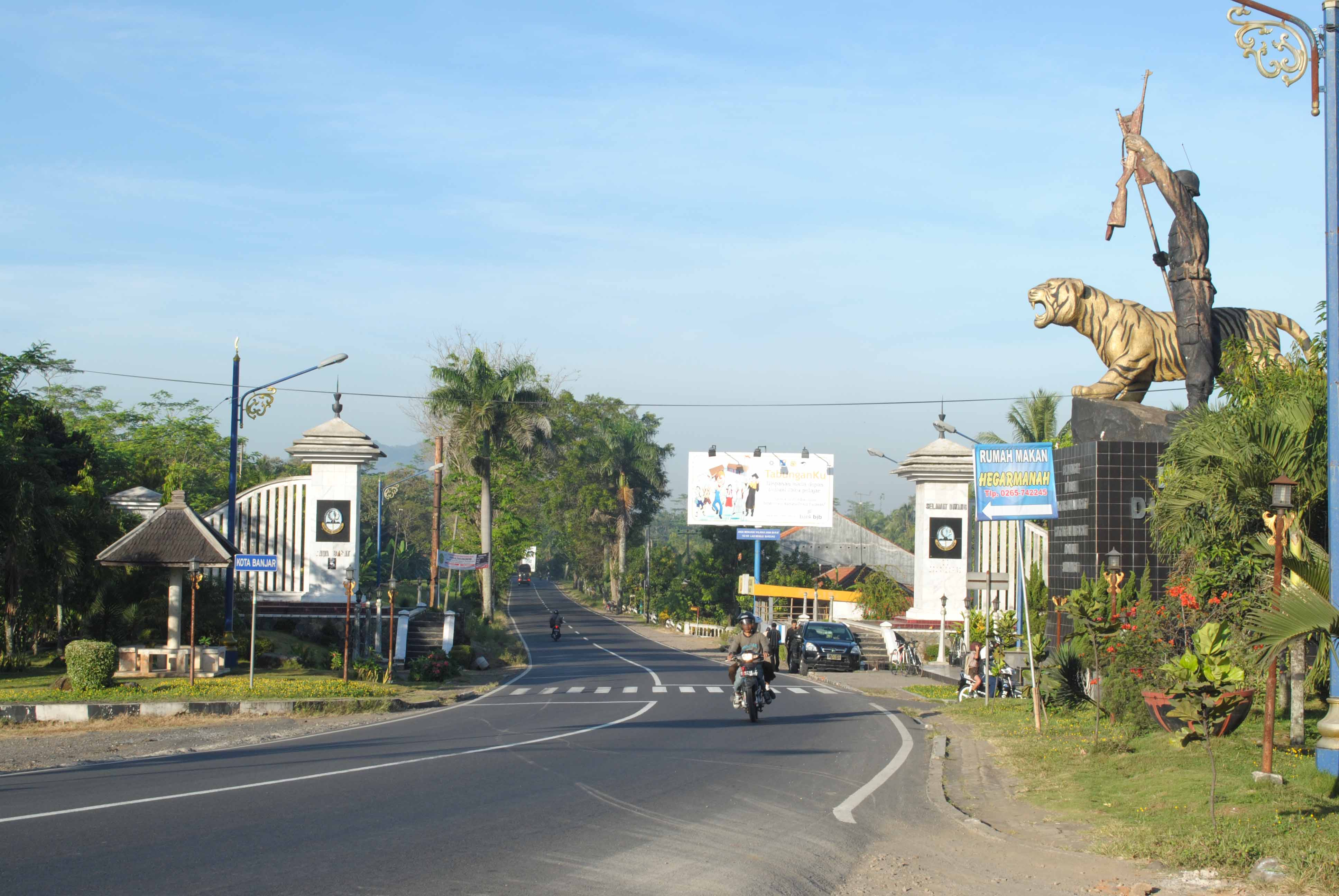 Banjar Jabar